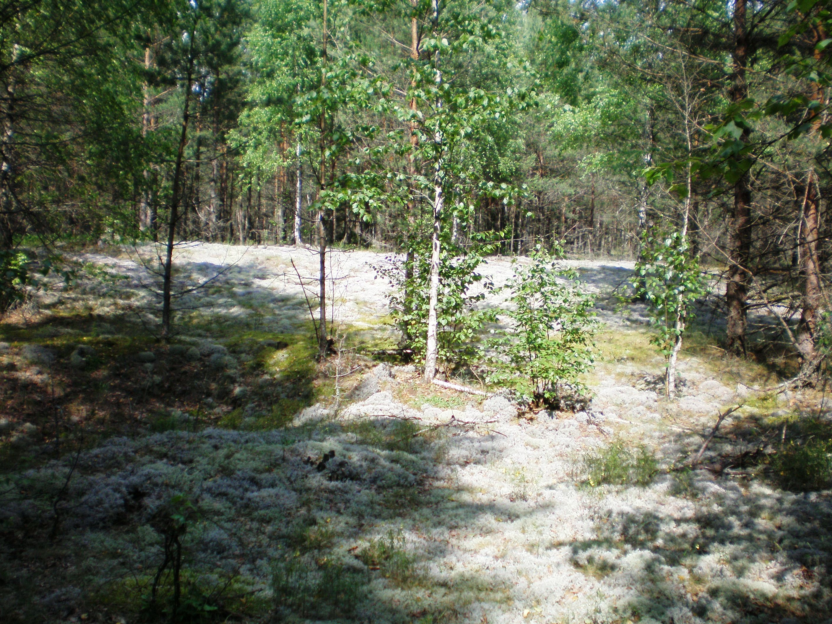 Dainavos giria, Druskininkų sav.